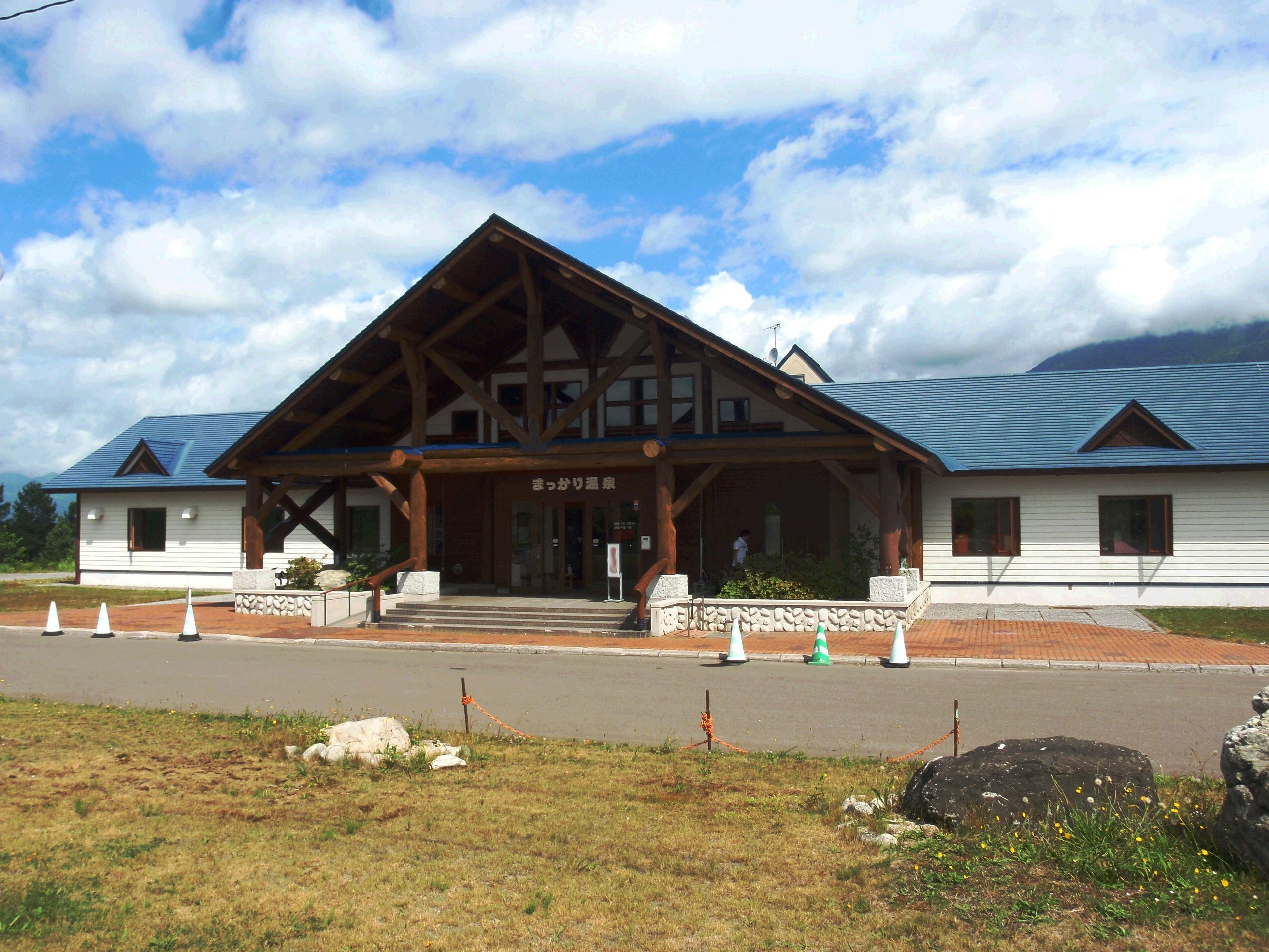 真狩村、真狩温泉の日帰り入浴施設「まっかり温泉」